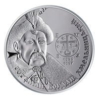 Богдан Хмельницький 2015 реверс